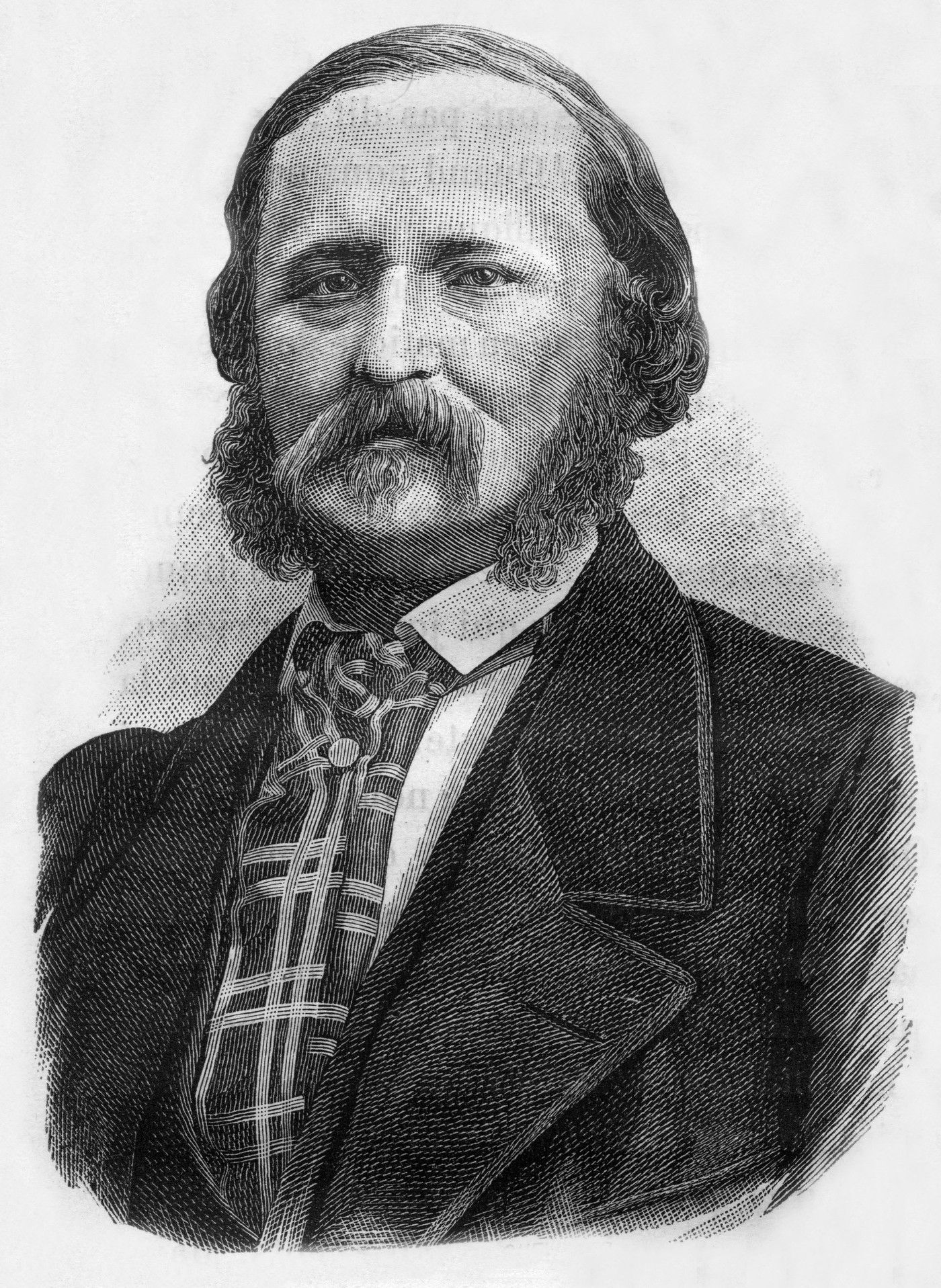 Léon Scott